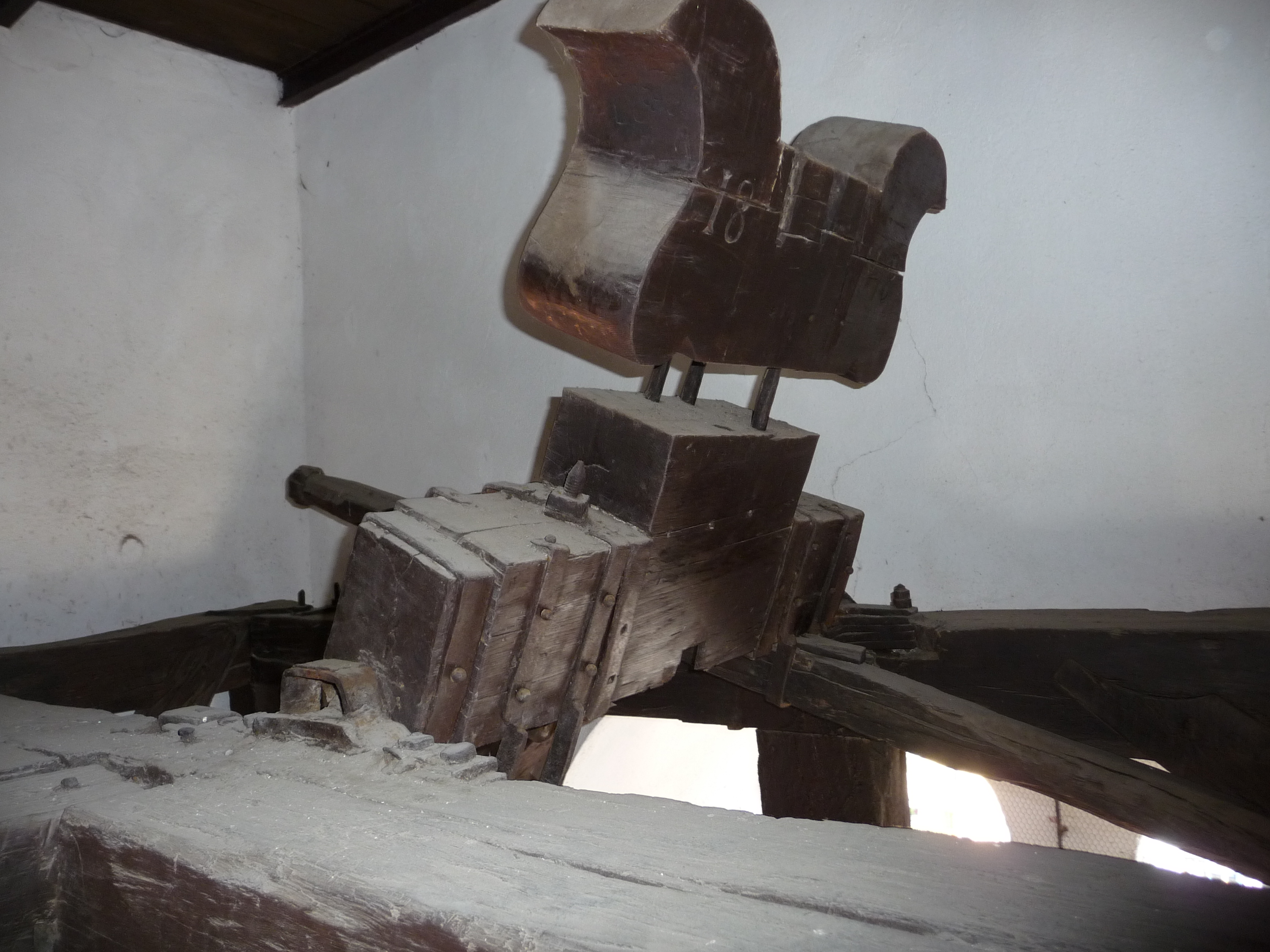 Pozostatok jarma zvona